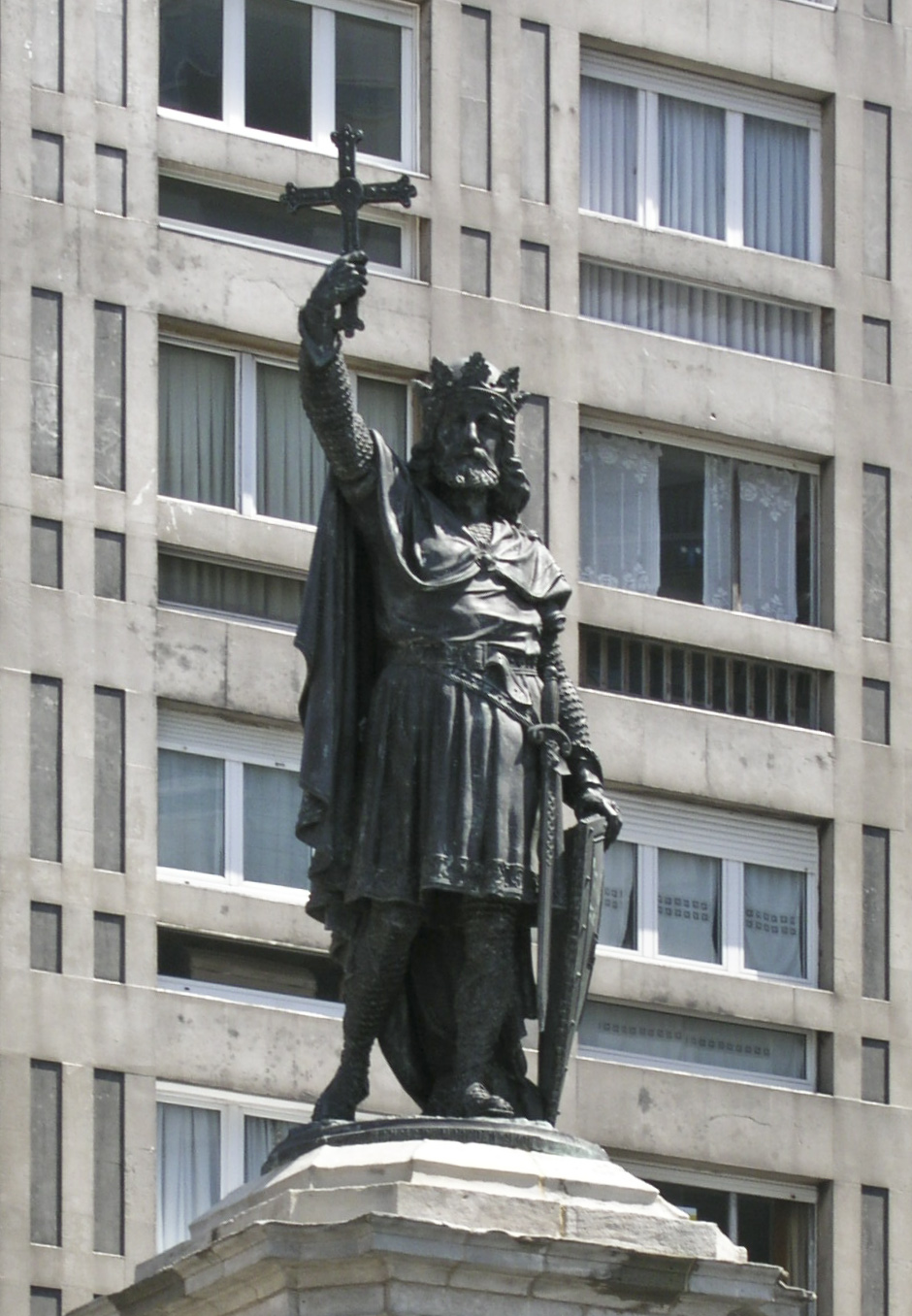 Pelayo I of Asturias, Gijón